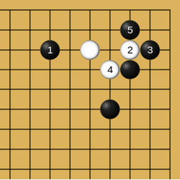 (Étape 1) Répondre à un atari au jeu de go